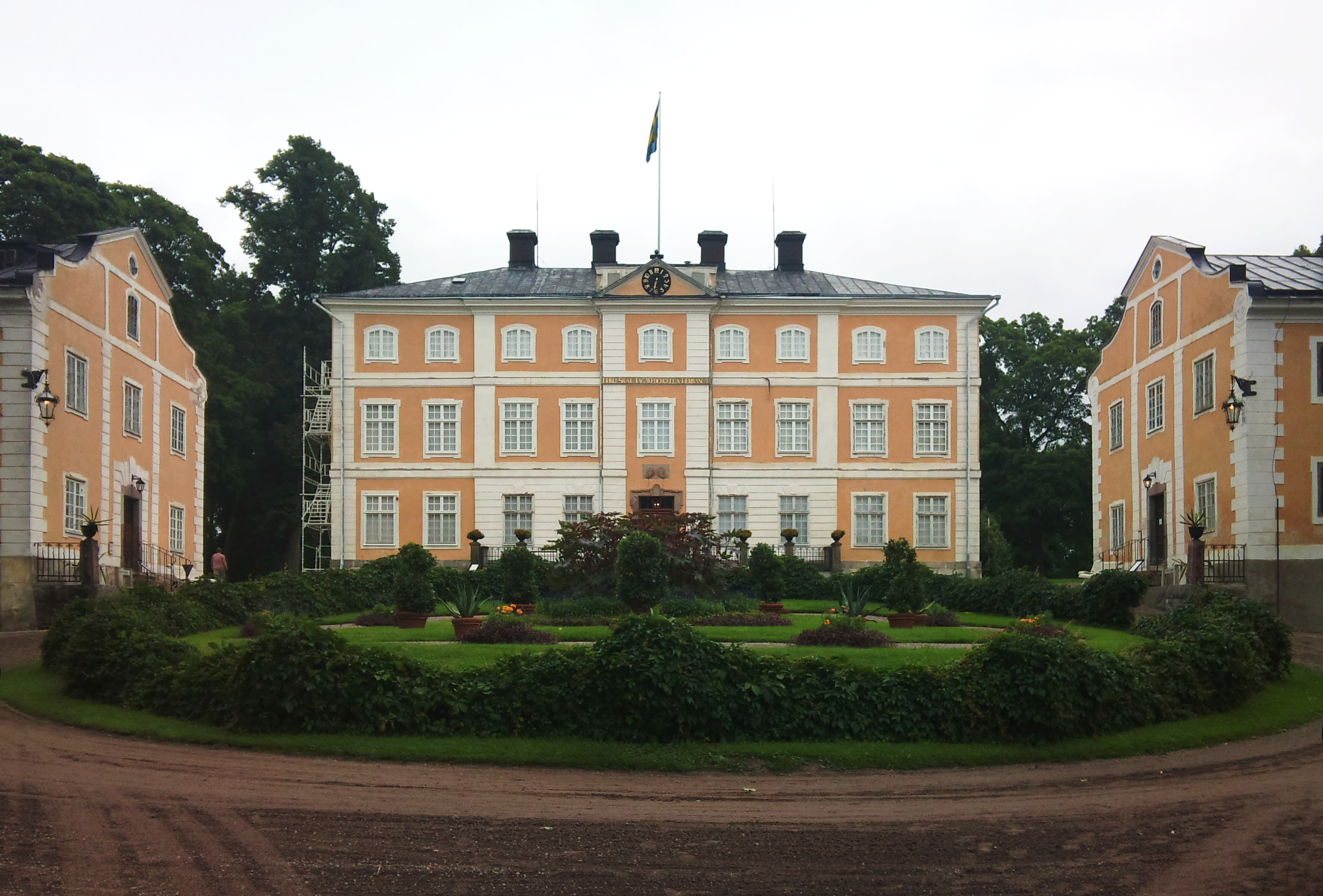 Julita herrgård ägdes av Arthur Bäckström fram till 1941 då han doneradegods och ägor till Nordiska museet. Här följer ett utdrag ur testamentet: "Hufvudbyggnaden med flyglar och ekonomibyggnader jemte angrän­sande område såsom trädgård och park böra så vidt möjligt bibehållas i oförändrat skick för att kommande slägten gifva en trogen bild, hur en gammal sörmländsk herrgård af betydligare omfång tedde sig under slutet af förra och början af innevarande århundrade."